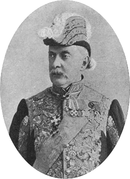 Иван Александрович Всеволожский, директор Эрмитажа и Императорских театров.